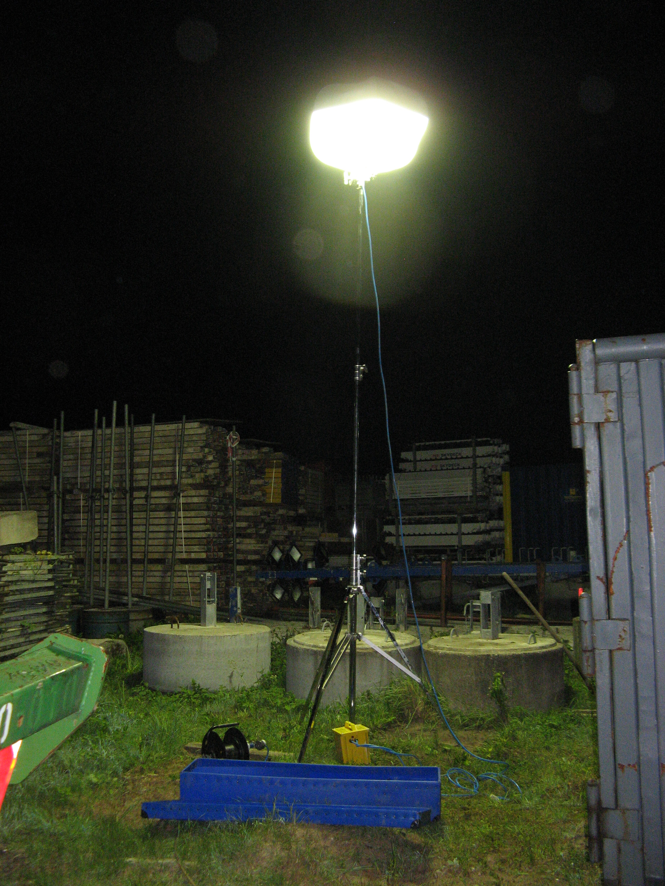 Powermoon, Leuchtbaloon, der Fachgruppe Beleuchtung des Technischen Hilfswerks